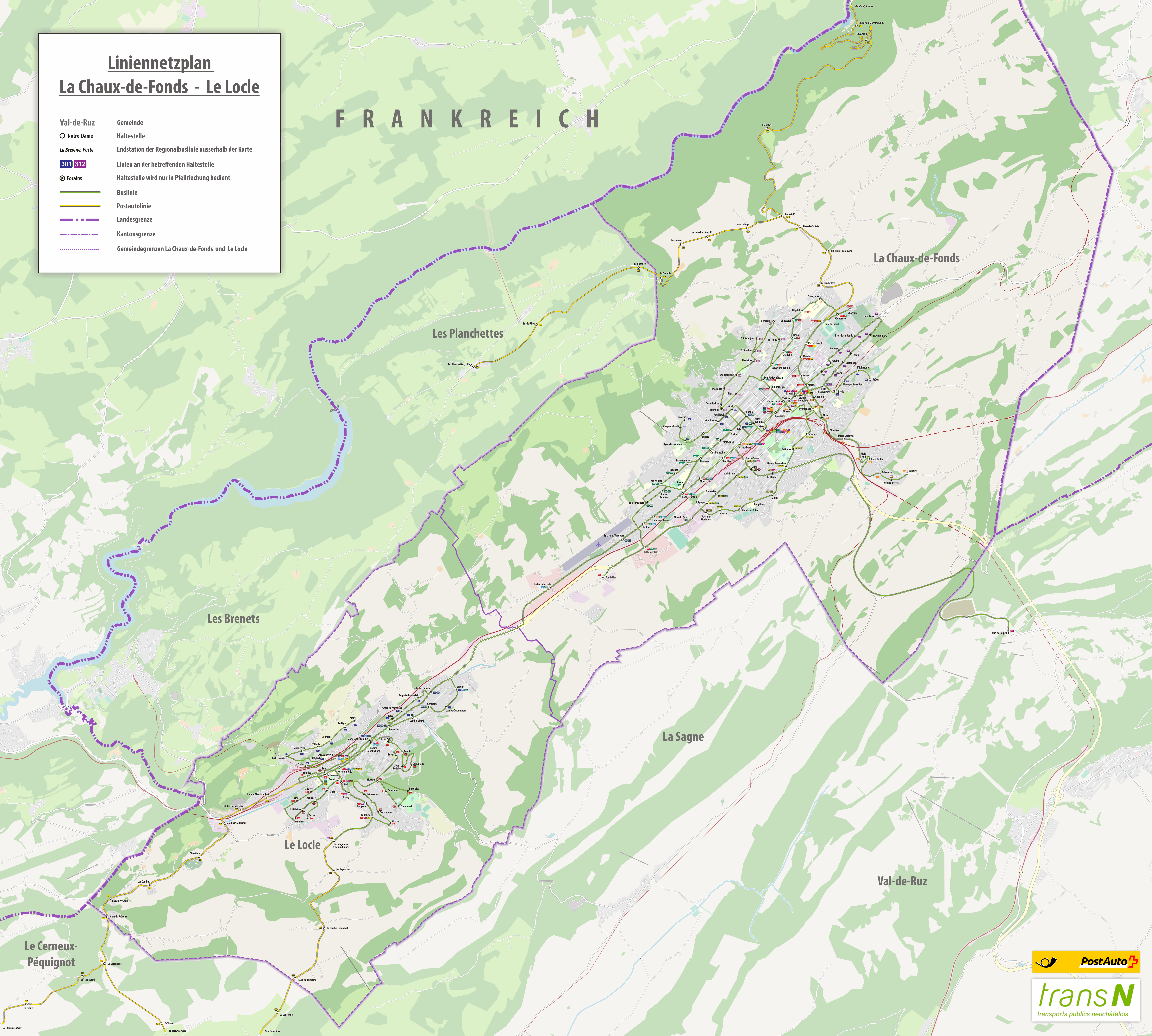 Liniennetzplan der Neuenburger Verkehrs-Betriebe (transN) La Chaux-de-Fonds und Le Locle, 2020